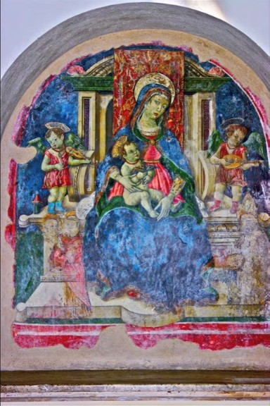 Affresco Madonna in trono con il Bambino: datata 1497 - chiesa di sant'Agostino (Amatrice)